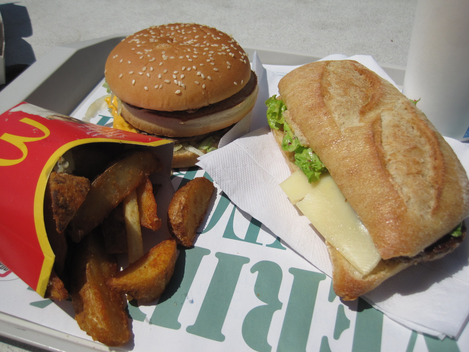 McBaguette et BigMac ...